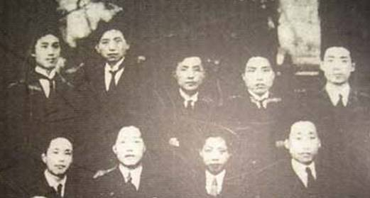 中文（中国大陆）: 少年共产党笫二次大会集体照